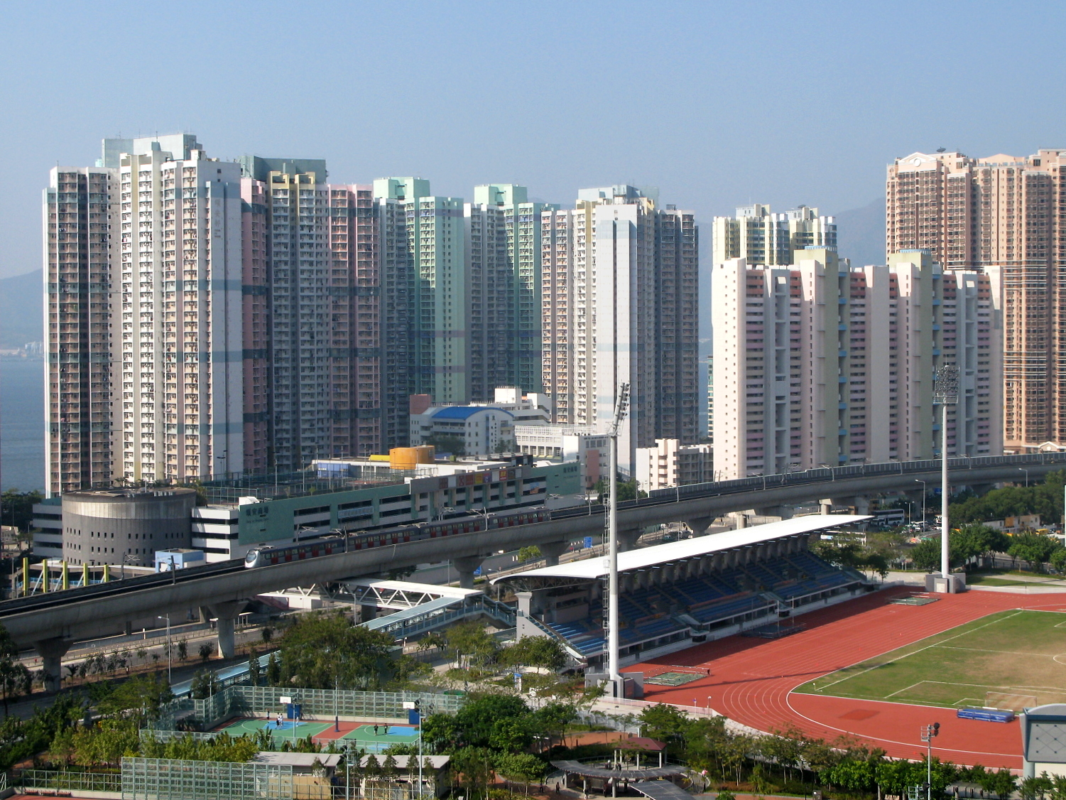 HK Chung On Estate 頌安邨